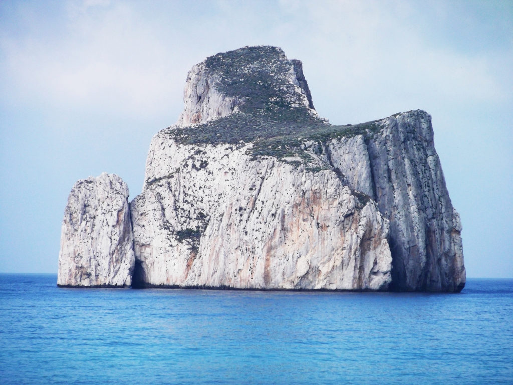 Sardu: Concali su Terràinu bidu de s'arenàrgiu de Masua.